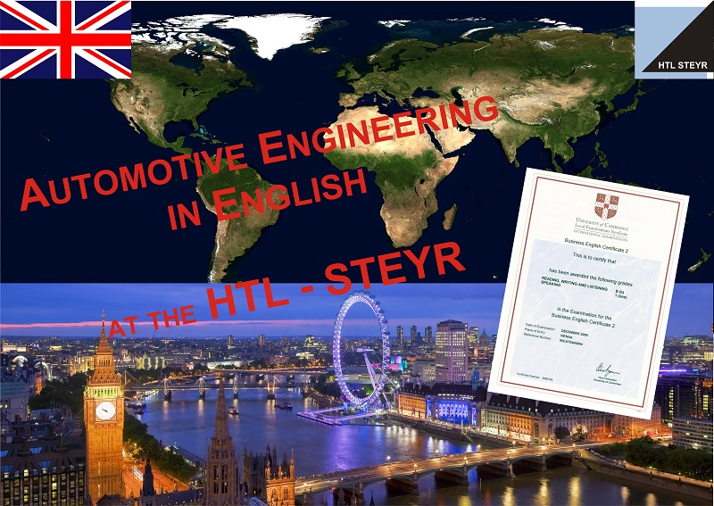 Plakat der HTL Steyr Englischklasse